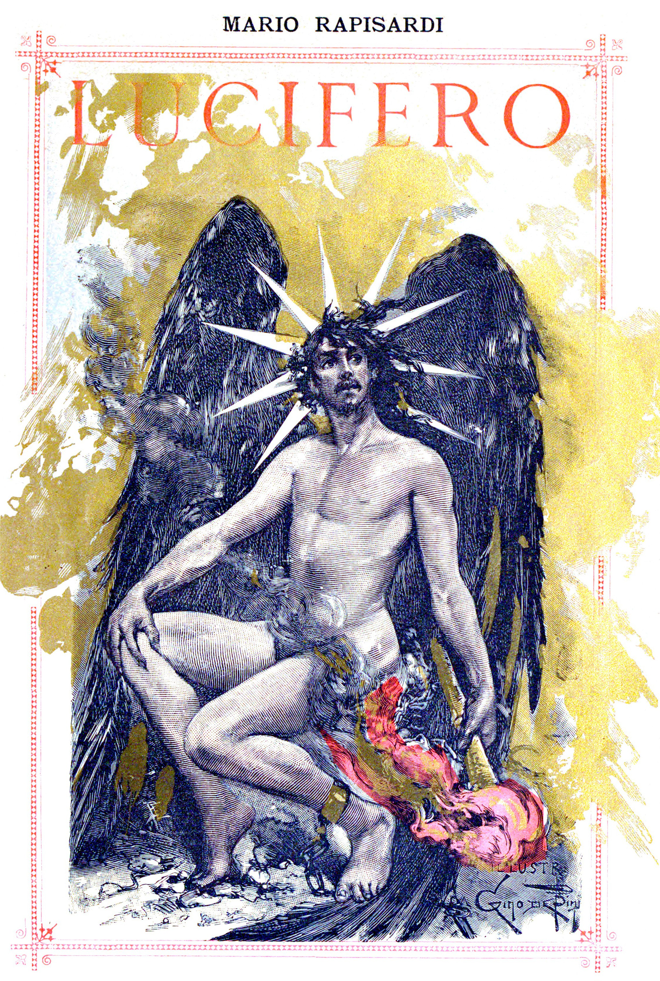 Copertina di Lucifero. Poema di Mario Rapisardi. Quarta Edizione corretta nuovamente dall'Autore e illustrata da 40 disegni di Gino De' Bini. Roma, Edoardo Perino editore, 1887.